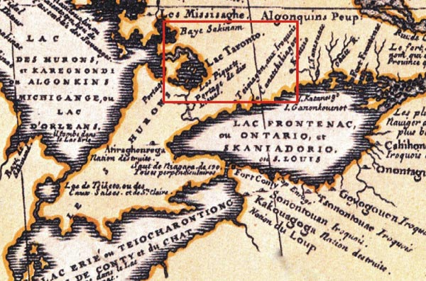 Detailkarte aus dem Jahr 1688 von Vincenzo Maria Coronelli: Dargestellt wird der westliche Teil von Neufrankreich mit den Seen Lac Taronto und Lake Simcoe